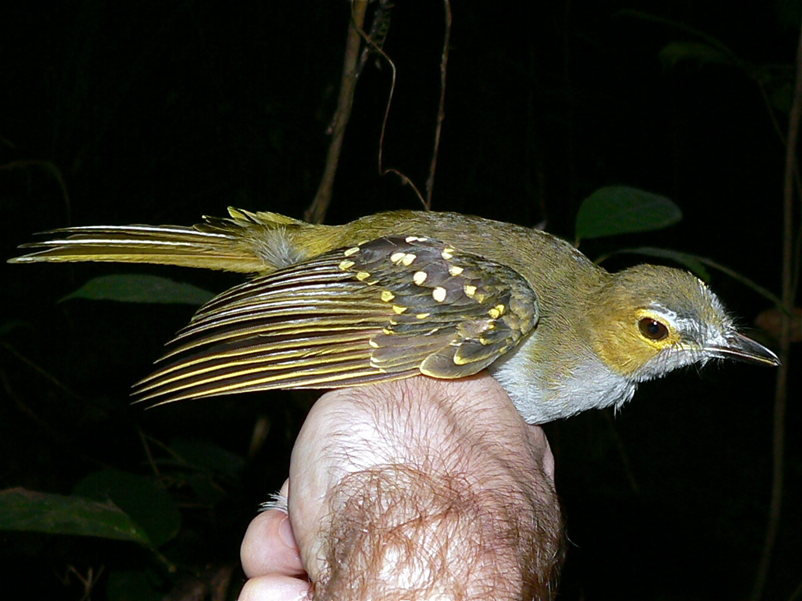 Korup NP, CAMEROON